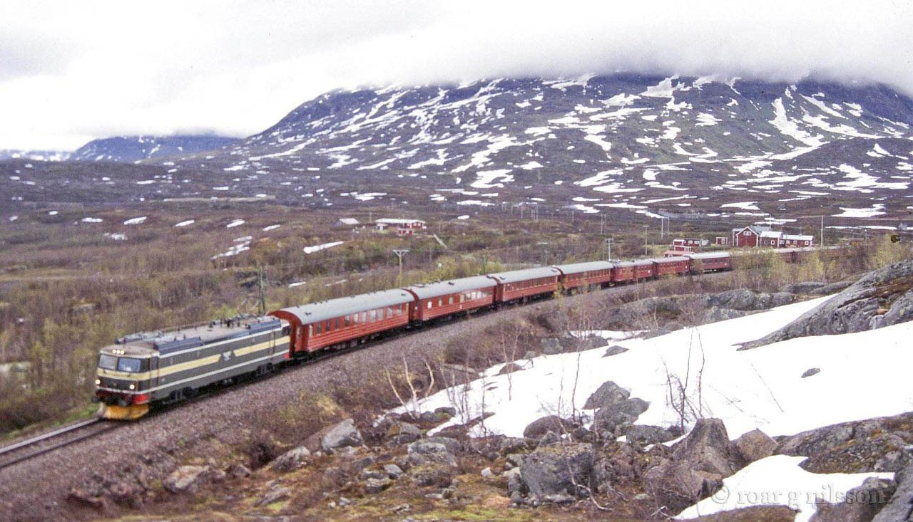 Chartertog ved Katterjåkk i juni 1995.